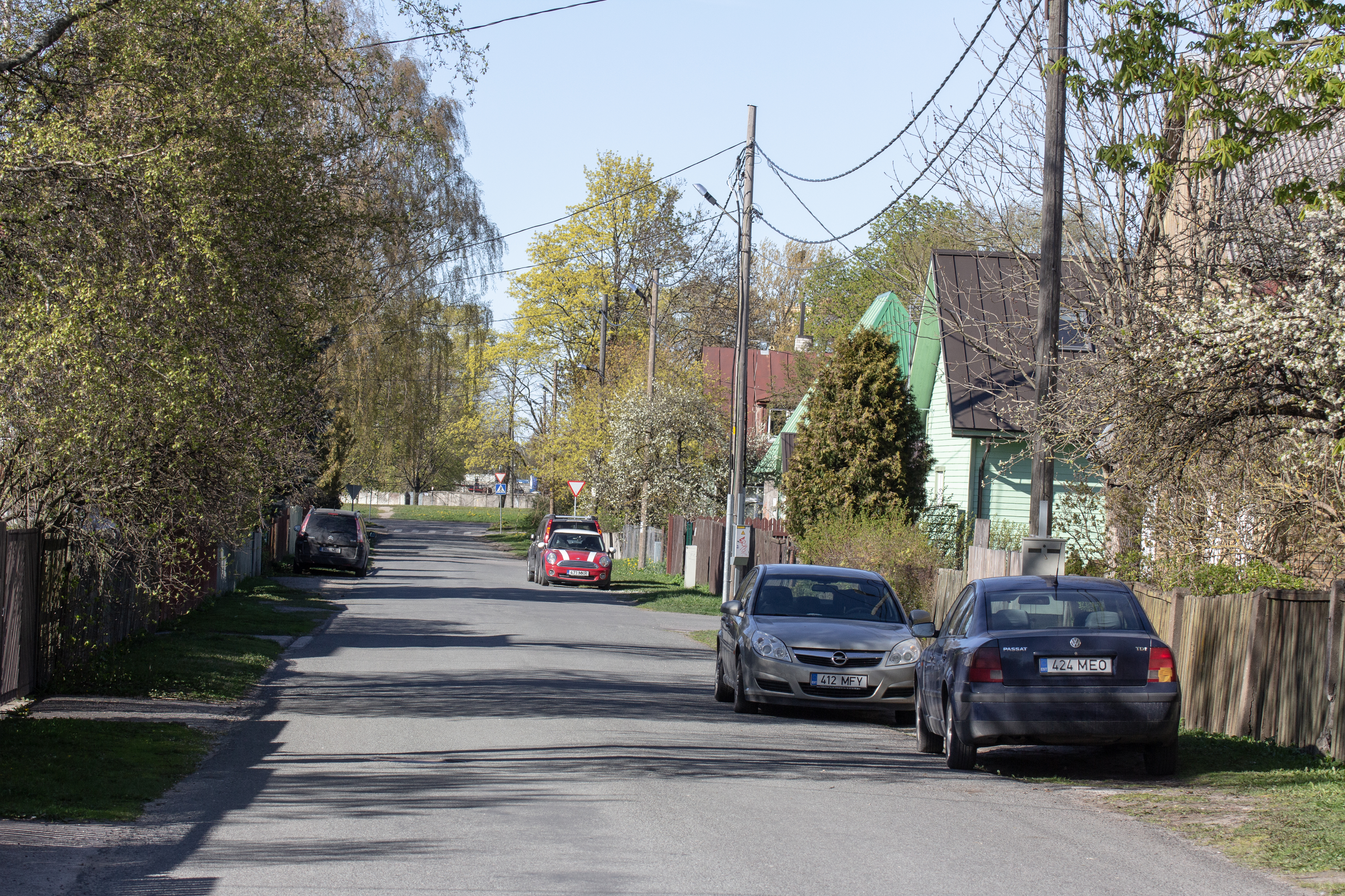 Niidi tänav, Tallinn, 09.05.2020